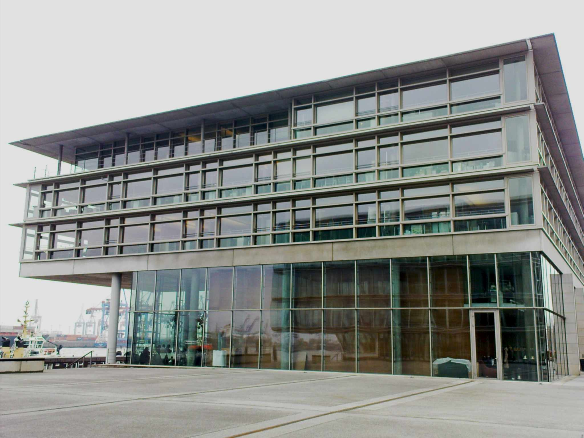 Firmensitz der Edel AG in Hamburg, Elbeseite